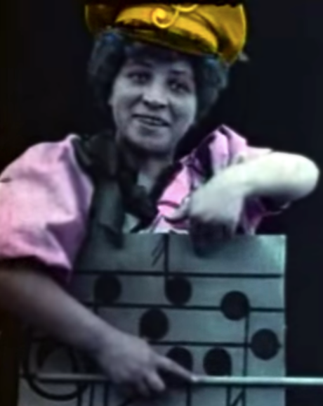 Portrait de Julienne Mathieu, actrice. Tiré de En avant la musique (1907)